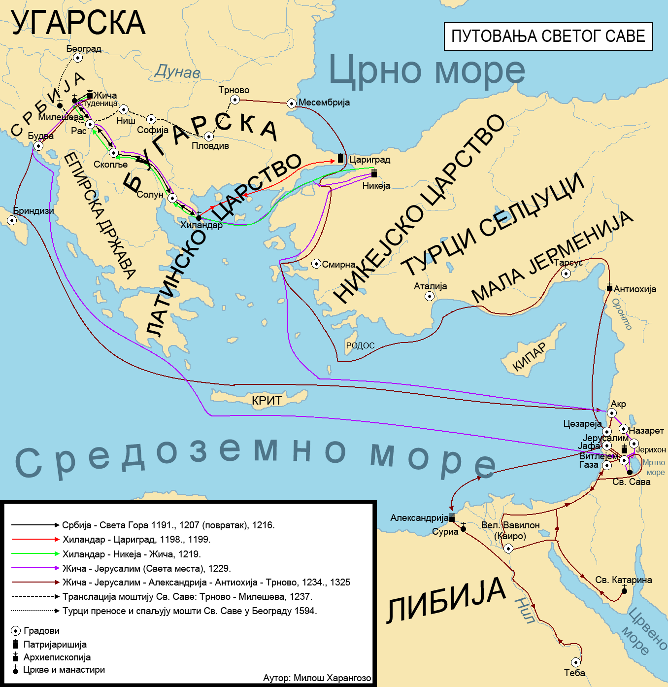 Мапа путовања Светог Саве.